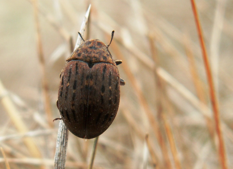 Byrrhus pilula. Location: The Netherlands - Weert - Weerter- en Budelerbergen (Limburgs deel)